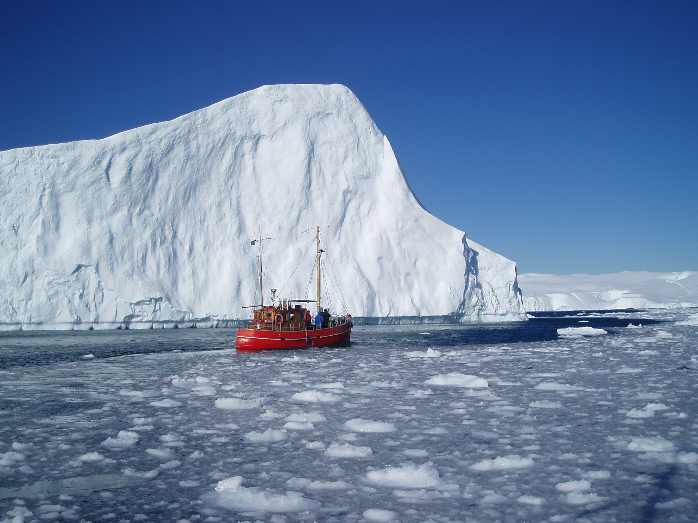 Båt og isfjell på Grønland Keywords: The Arctic, Boats and ships, Fisheries, Outdoor life, Ice and snow, Nature, Transport, Greenland